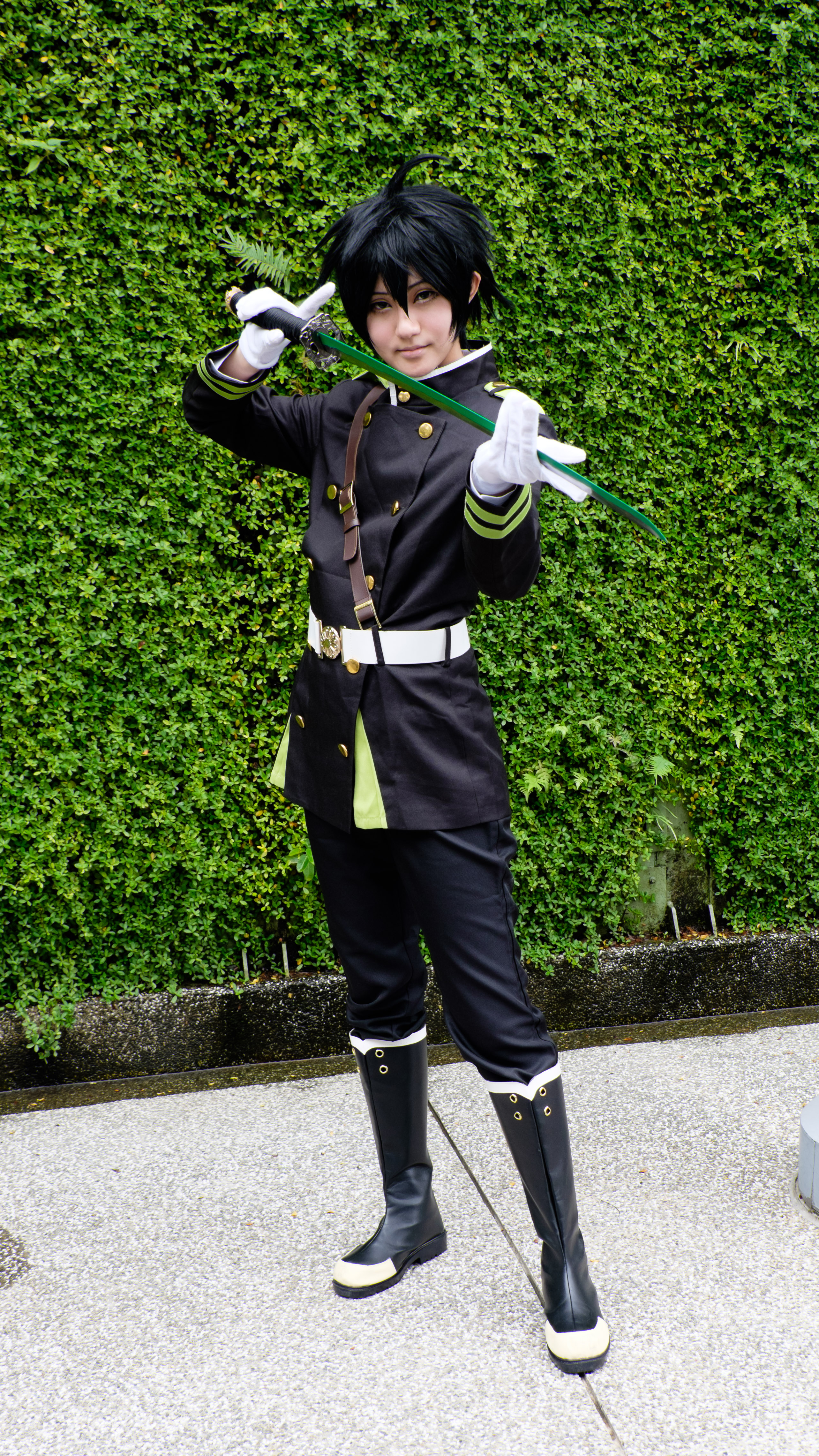 Fancy Frontier 26第一日上午花博競艷館外，＜終わりのセラフ＞百夜優一郎cosplayer。